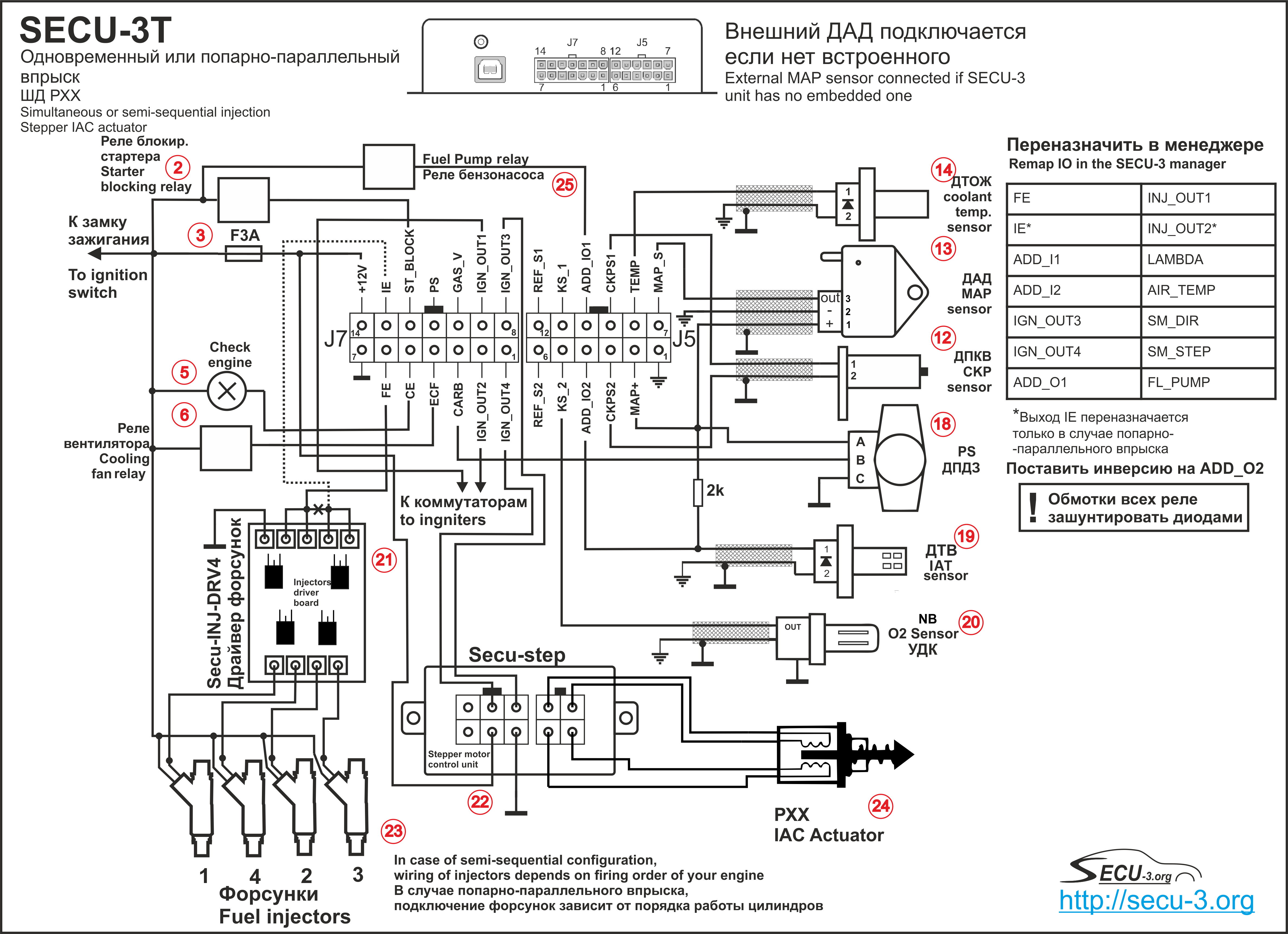 Пример подключения блока SECU-3T для управления одновременным или попарно-параллельным впрыском на 4-х цилиндровом двигателе. Используются высокоомные форсунки и РХХ шагового типа.